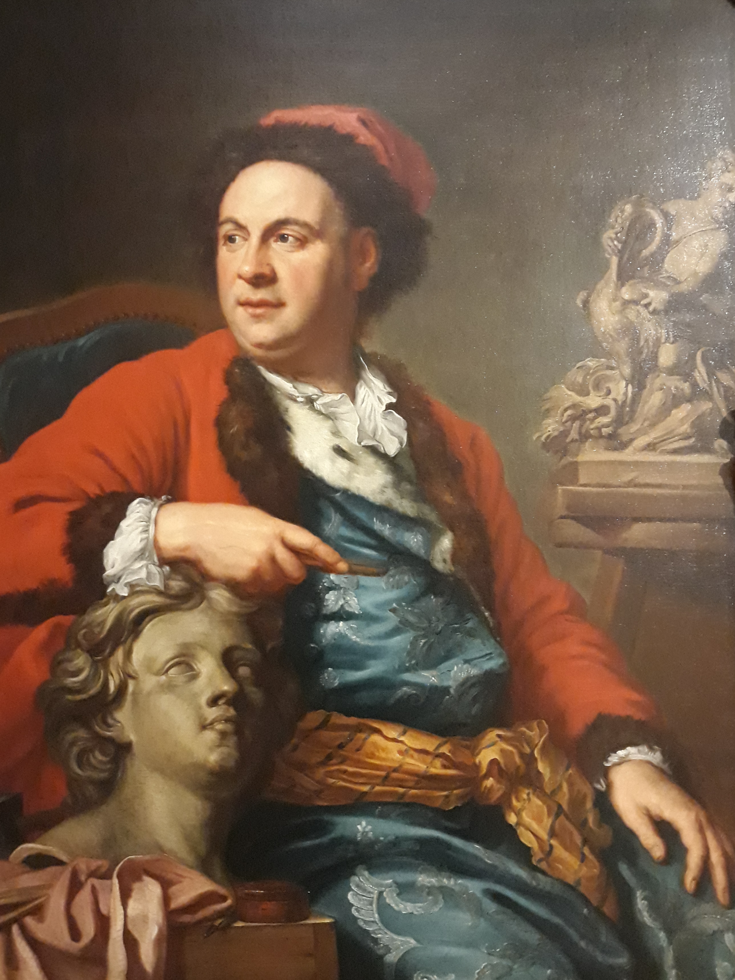 Ritratto di Francesco Ladatte ad opera di Charles-André van Loo